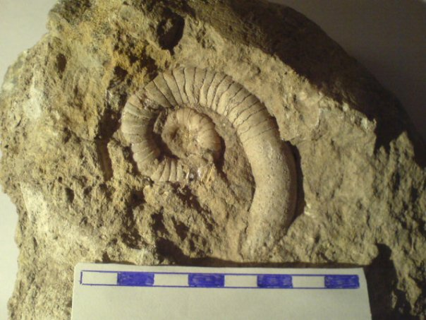 знойдзены ў Лідскім р-не ў 2008 г.